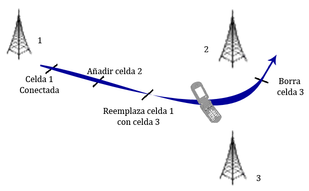 Esquema del proceso soft-handover